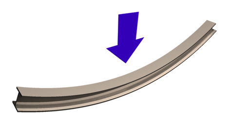 Benging an I-beam